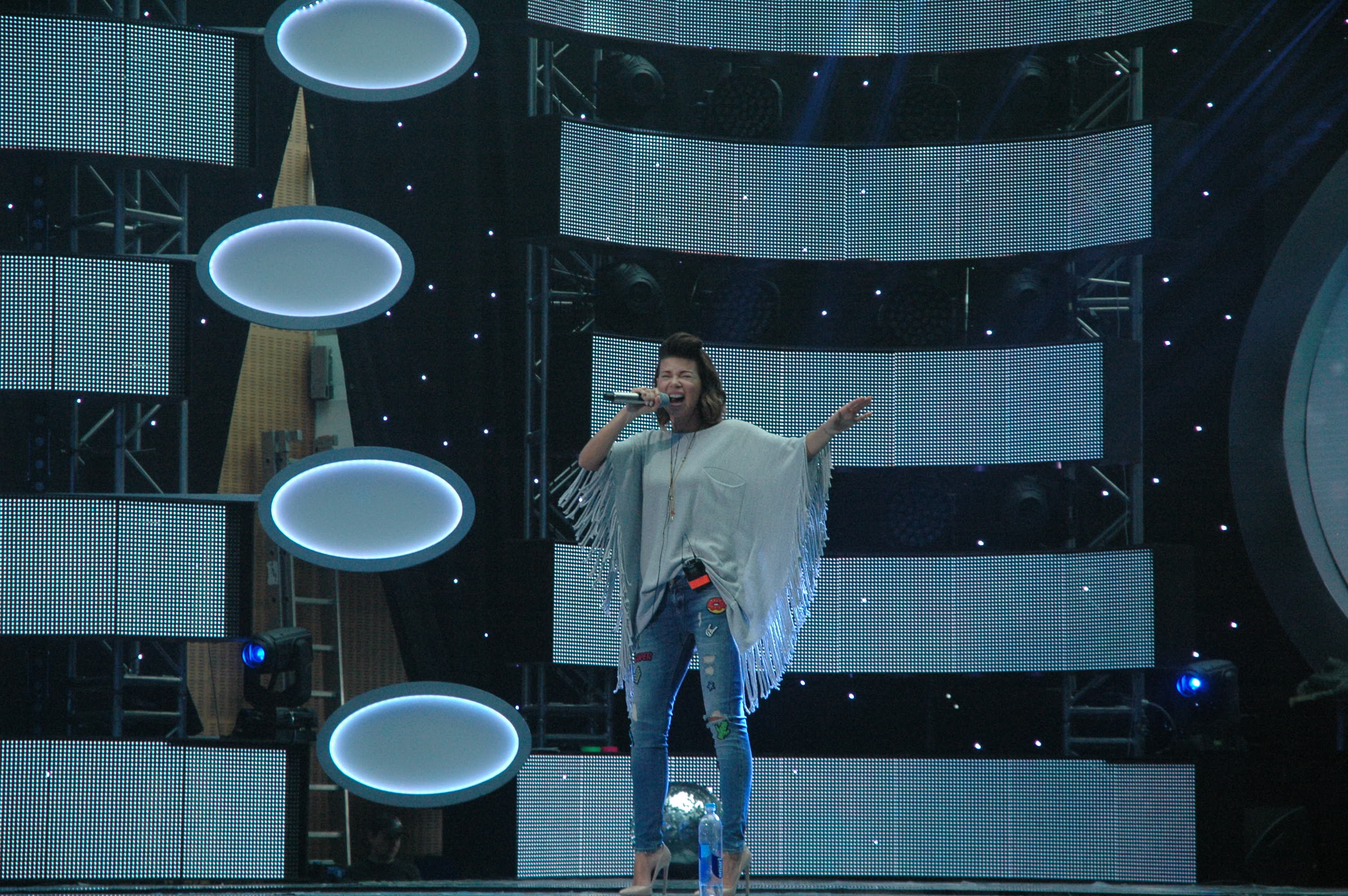 Edyta Górniak podczas prób do występu w Krajowych Eliminacjach do Konkursu Piosenki Eurowizji 2016.